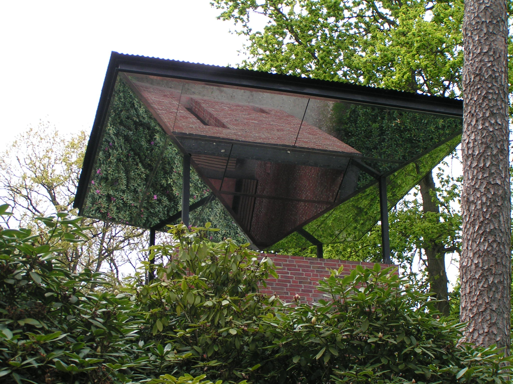 Landschaftfenster "Rhododendron" Westerstede